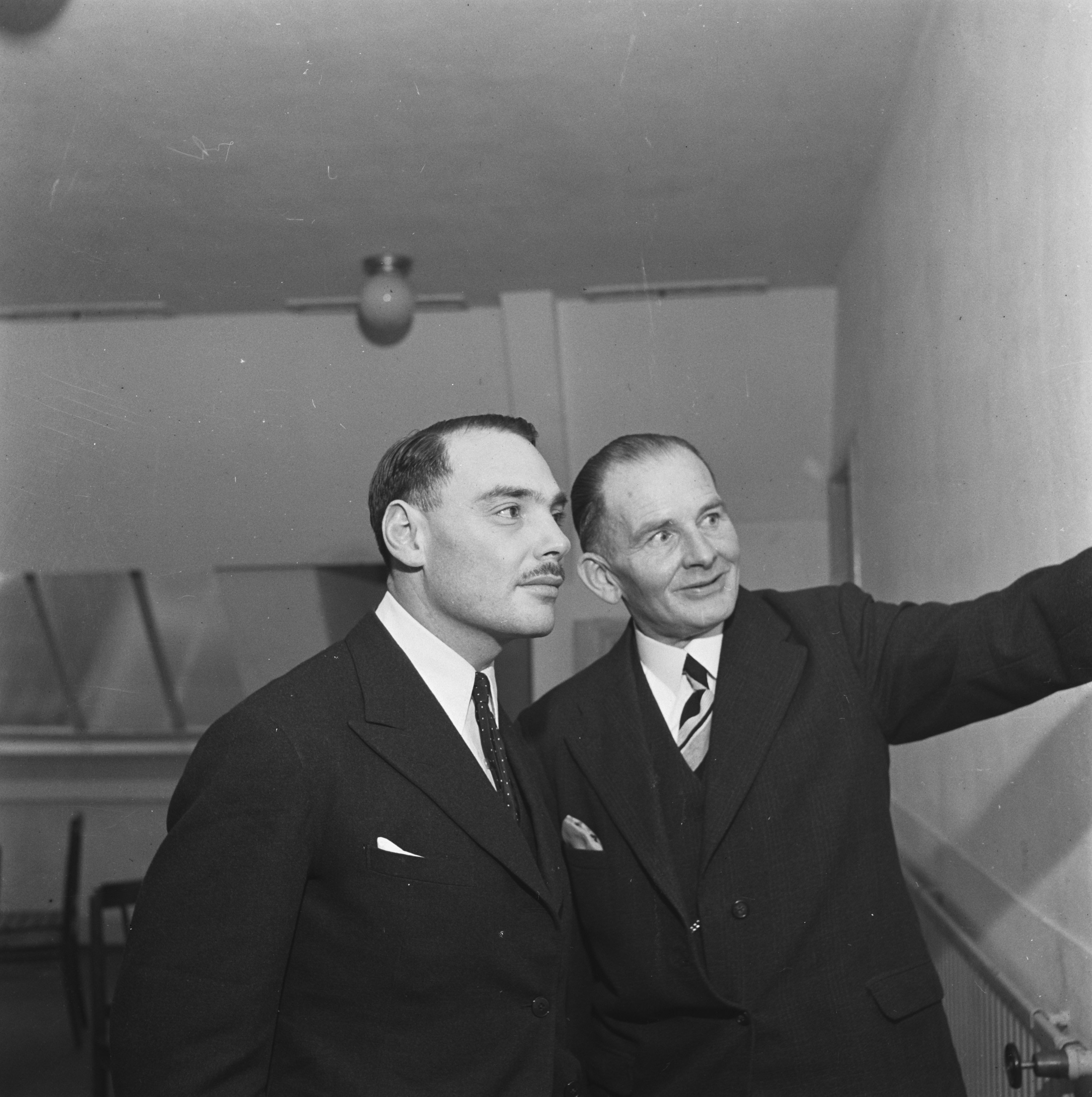 Collectie / Archief : Fotocollectie Anefo Reportage / Serie : [ onbekend ] Beschrijving : Harry Oppenheimer (links) in Amsterdam Datum : 30 november 1945 Locatie : Amsterdam, Noord-Holland Trefwoorden : bezoek, mannen, tweede wereldoorlog Persoonsnaam : Oppenheimer, Ernest Fotograaf : Raucamp, Koos / Anefo Auteursrechthebbende : Nationaal Archief Materiaalsoort : Negatief (zwart/wit) Nummer archiefinventaris : bekijk toegang 2.24.01.03 Bestanddeelnummer : 901-1717